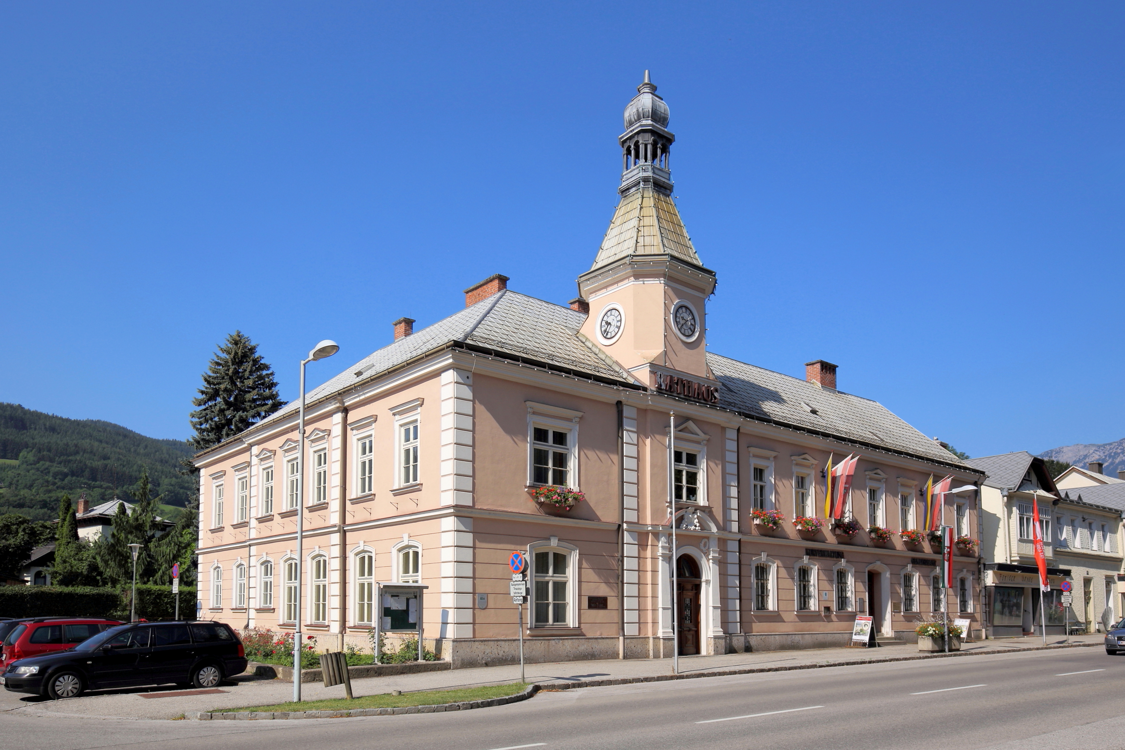 Ostansicht des Rathauses der niederösterreichischen Marktgemeinde Reichenau an der Rax.Ein strenghistoristischer Bau mit polygonalem Uhrenaufsatz der 1861 errichtet wurde. In den Jahren 1893/94 wurde der Bau nach Plänen von Moritz Hinträger erweitert und 1950 erfolgte ein Umbau.